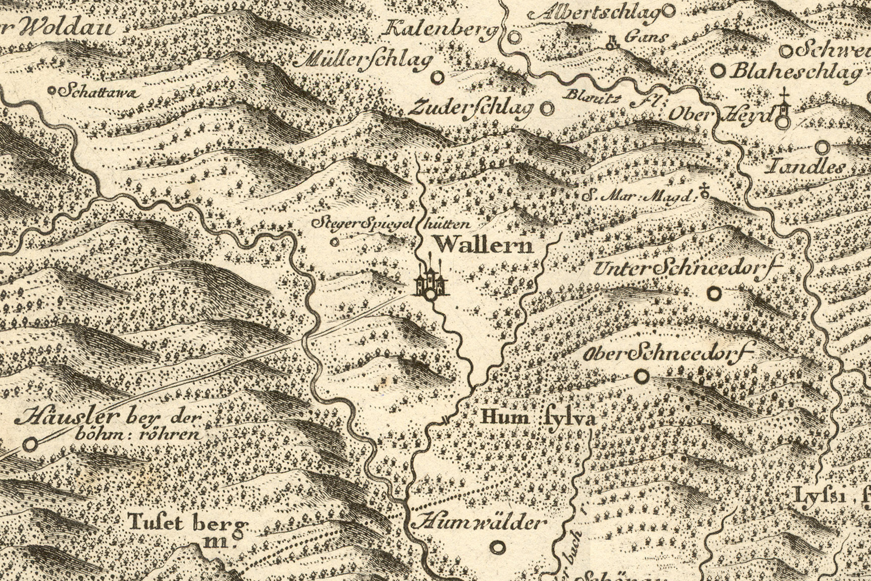 Volary na Müllerově mapě Čech z roku 1720, výřez z mapového listu XXII